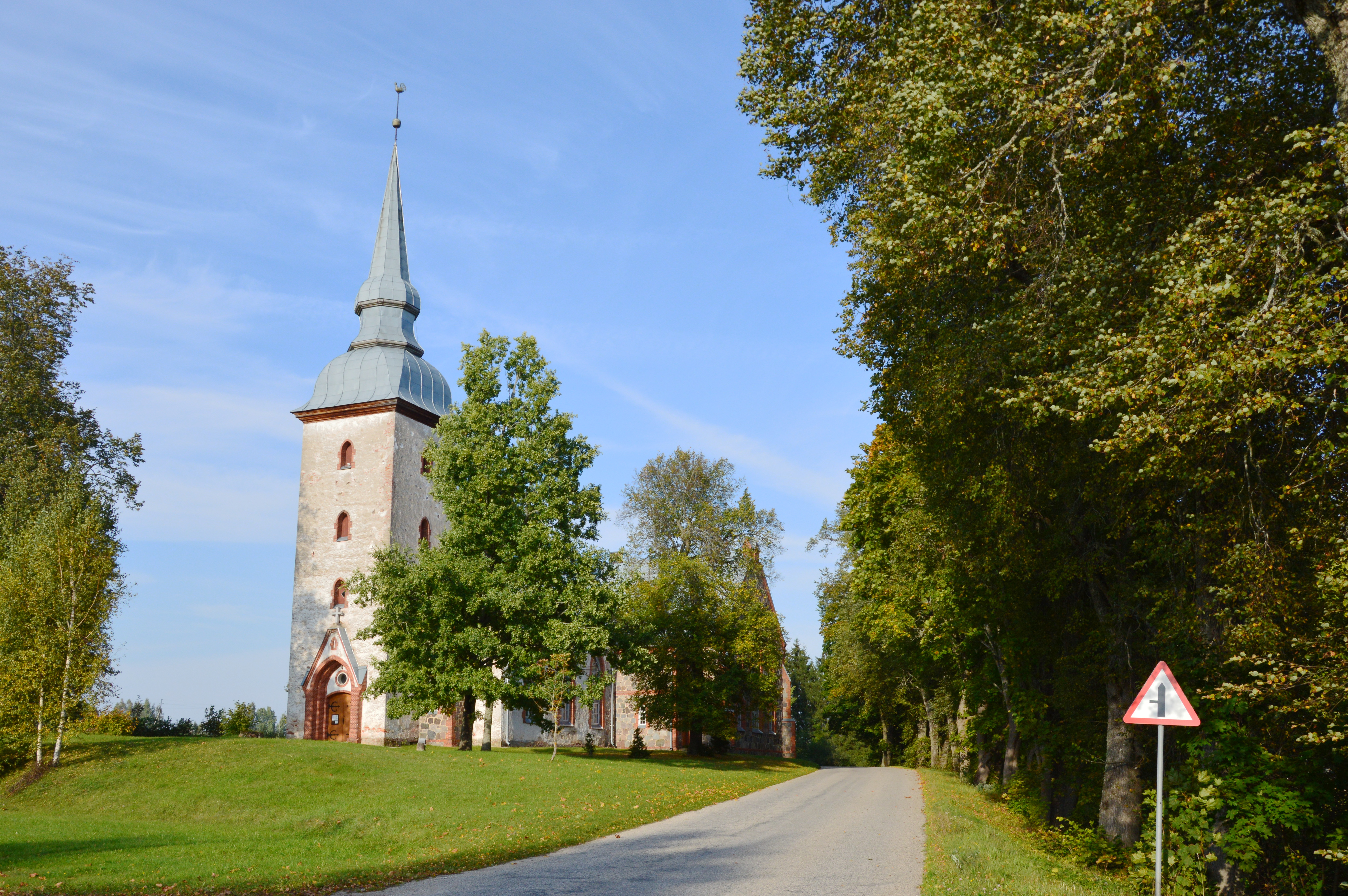 Vastseliina kirik